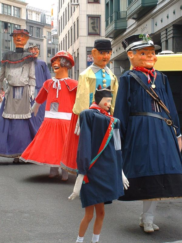 De reuzen van de Meyboom, hier op verplaatsing in Steenvoorde (F)